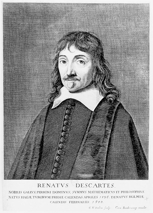 René Descartes (1596-1650)